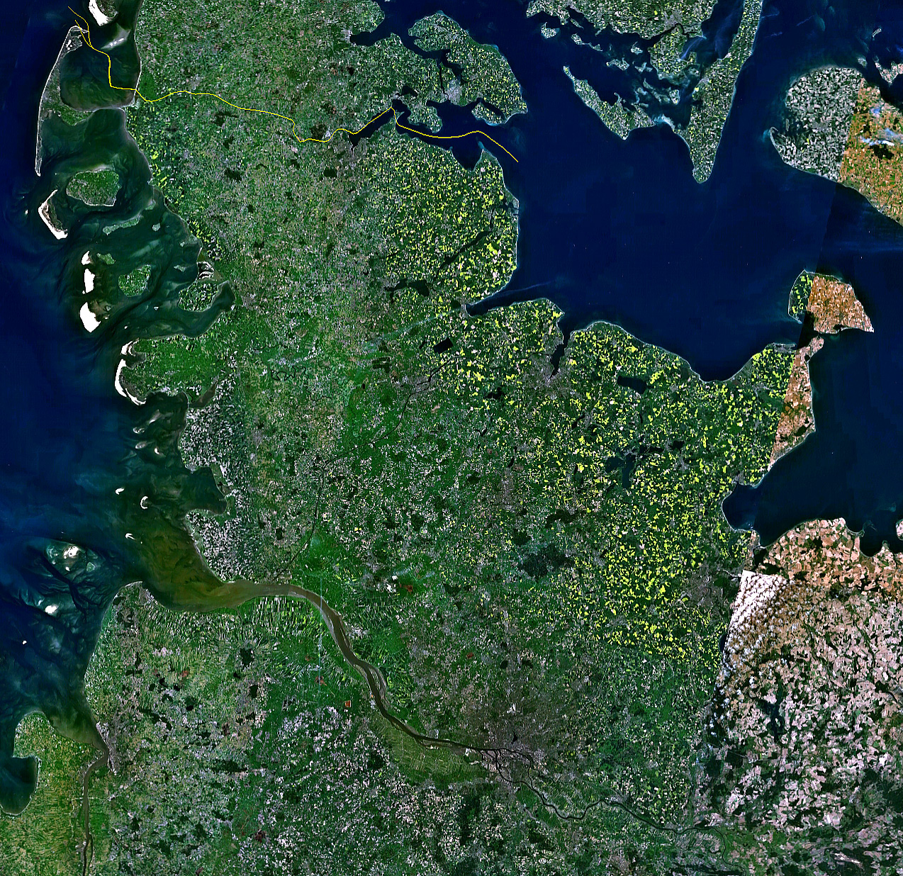 Satellitenaufnahme Schleswig-Holstein und Hamburg